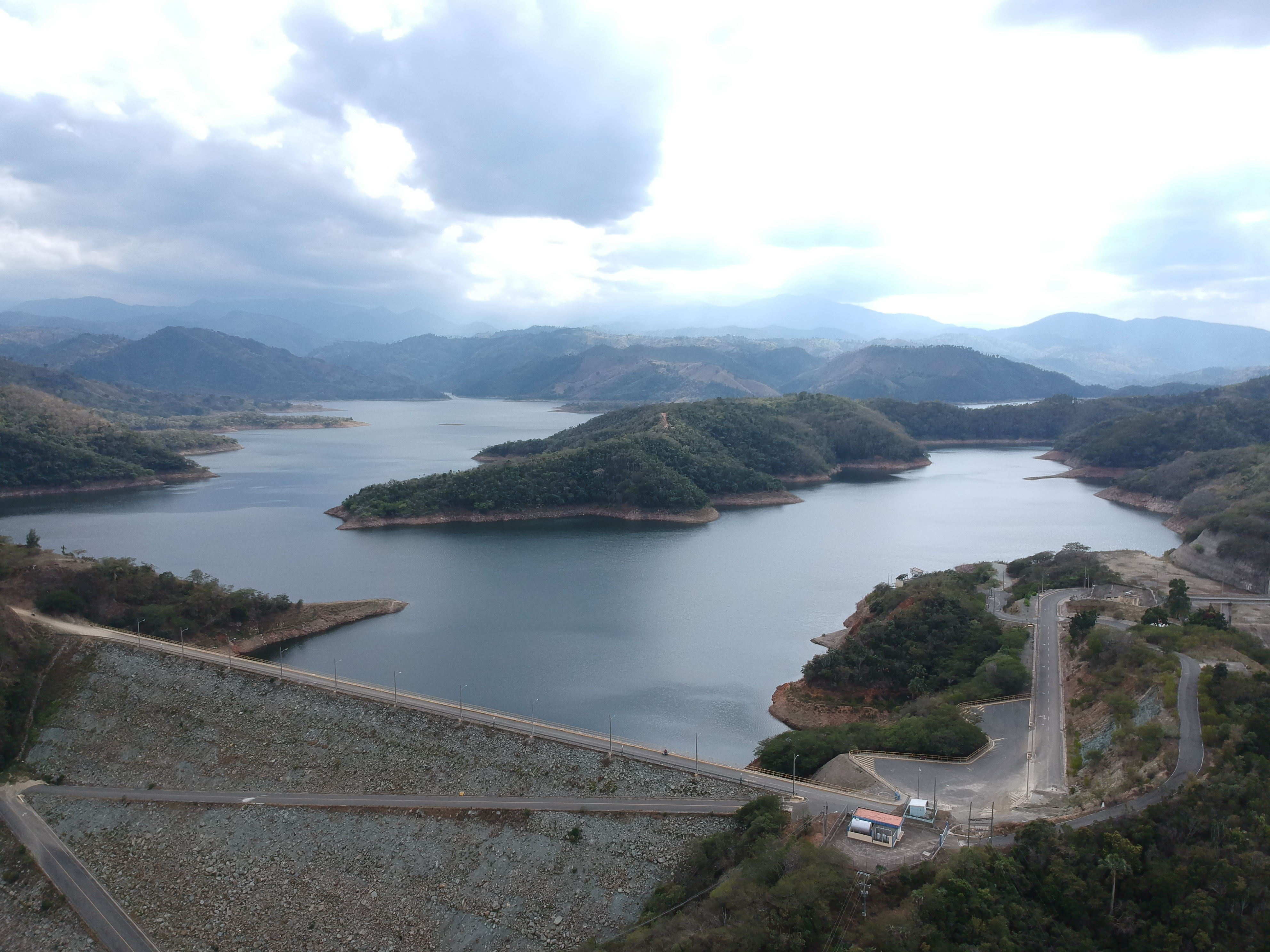 Vista panorámica de la Presa de Monción.